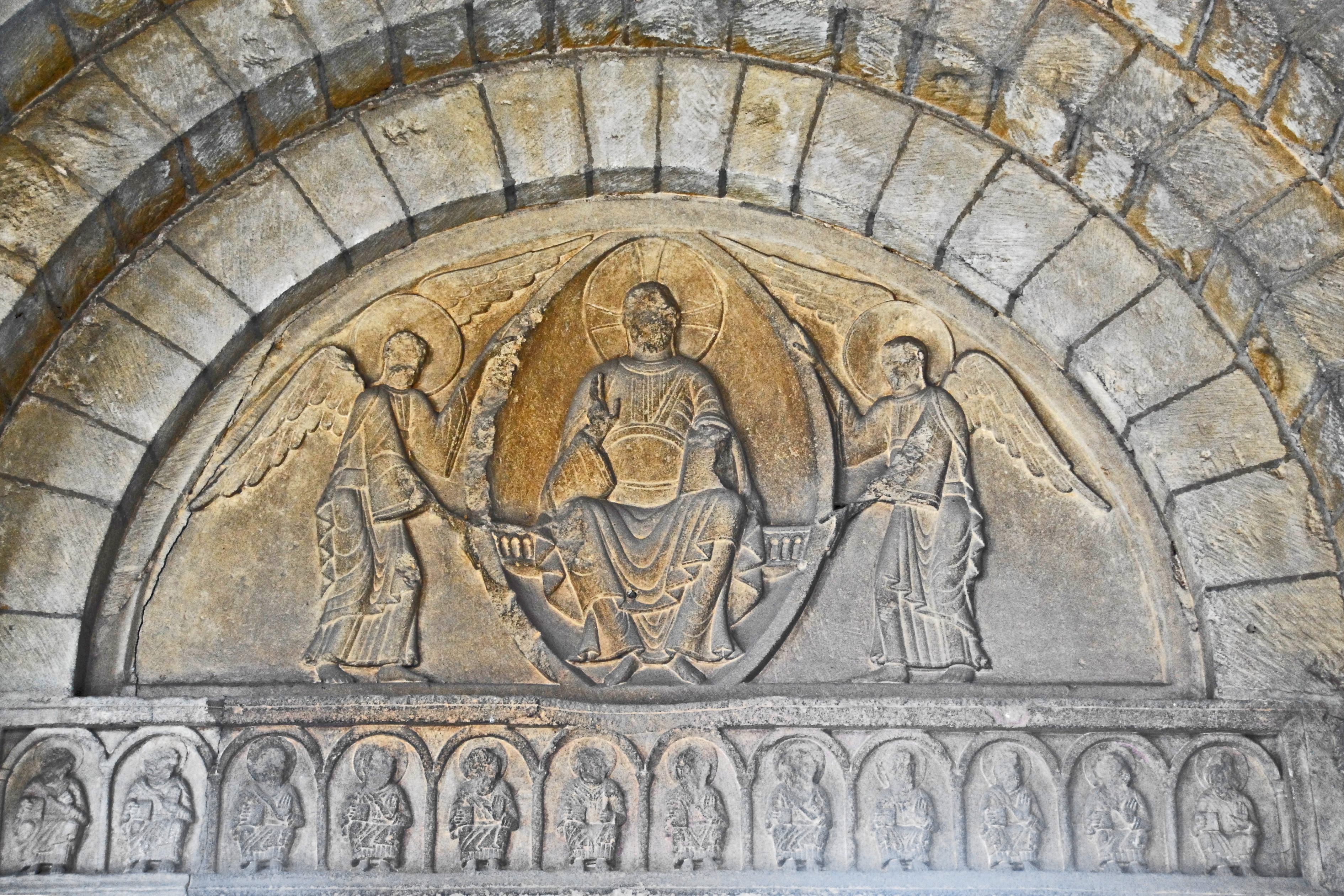 Westportal, Tympanon